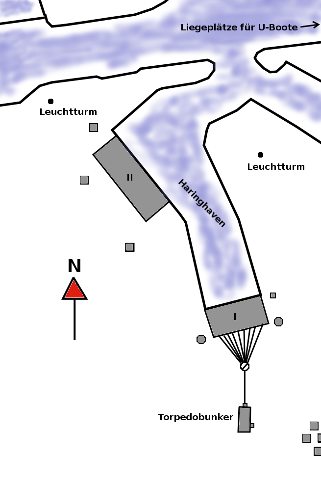 Unmaßstäbliche Skizze der Schnellboot-Bunker und des Torpedobunkers in IJmuiden in den Niederlanden während des Zweiten Weltkrieges.